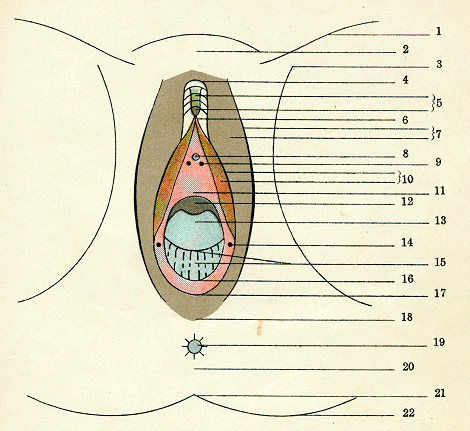 UITWENDIGE GESLACHTSORGANEN DER VROUW; Vulva (schematisch) 1. Liesplooi (dubbelzijdig). 2. Schaamberg; Mons Veneris. 3. Beenplooi (dubbelzijdig). 4. Voorhuid van den kittelaar; Praeputium clitoridis. 5. Schacht en eikel van den kittelaar; Corpus et glans clitoridis, tezamen Clitoris genaamd. 6. Bandje van den kittelaar; Frenulum clitoridis. Tusschen praeputium en glans clitoridis, aan beide zijden van het frenulum, ligt het voorhuidzakje, Saccus praeputialis. 7. Rand en binnenvlakte van de groote schaamlip (dubbelzijdig); Labium maius (meervoud: labia maiora). 8. Uitmonding van de pisbuis; Ostium urethrae. 9. Uitmonding van de kleine voorhofsslijmklier (naar Skene genaamd, dubbelzijdig); de klier heet Glandula vestibularis minor (meervoud: glandulae vestibulares minores). 10. Vrije rand en binnenvlakte van de kleine schaamlip (dubbelzijdig); Labium minus (meervoud: labia minora). 11. Voorhof van de scheede; Vestibulum vaginae (de geheele plek tusschen de kleine schaamlippen). 12. Voorwand van de scheede (in den ingang van de scheede zichtbaar). 13. Ingang van de scheede; Introitus vaginae. 14. Uitmonding van de groote voorhofsslijmklier (dubbelzijdig); de klier heet Glandula vestibularis maior (meervoud: Glandulae vestibulares maiores), zij wordt gewoonlijk Glandula Bartholini genoemd. 15. Rand- en buiten vlakte van het maagdenvlies; Hymen (geschraffeerd geteekend). 16. Achterwand van de scheede (pas zichtbaar na verdwijning van het hymen). 17. Bandje, dat de kleine schaamlippen verbindt; Frenulum labiorum. 18. Bilnaad; Perineum. 19. Aars; Anus 20. Achterste bilnaad; Perineum posterius. 21. Punt van het staartbeen; Os coccygis. 22. Huid van de billen.